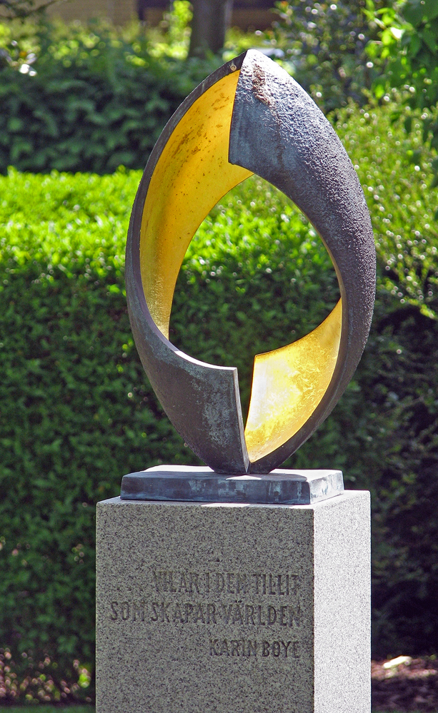 Sista raden i Karin Boyes dikt "Ja visst gör det ont när knoppar brister" återfinns på ett konstverk i Ystads gamla kyrkogårds minneslund. - Vilar i den tillit som skapar världen.